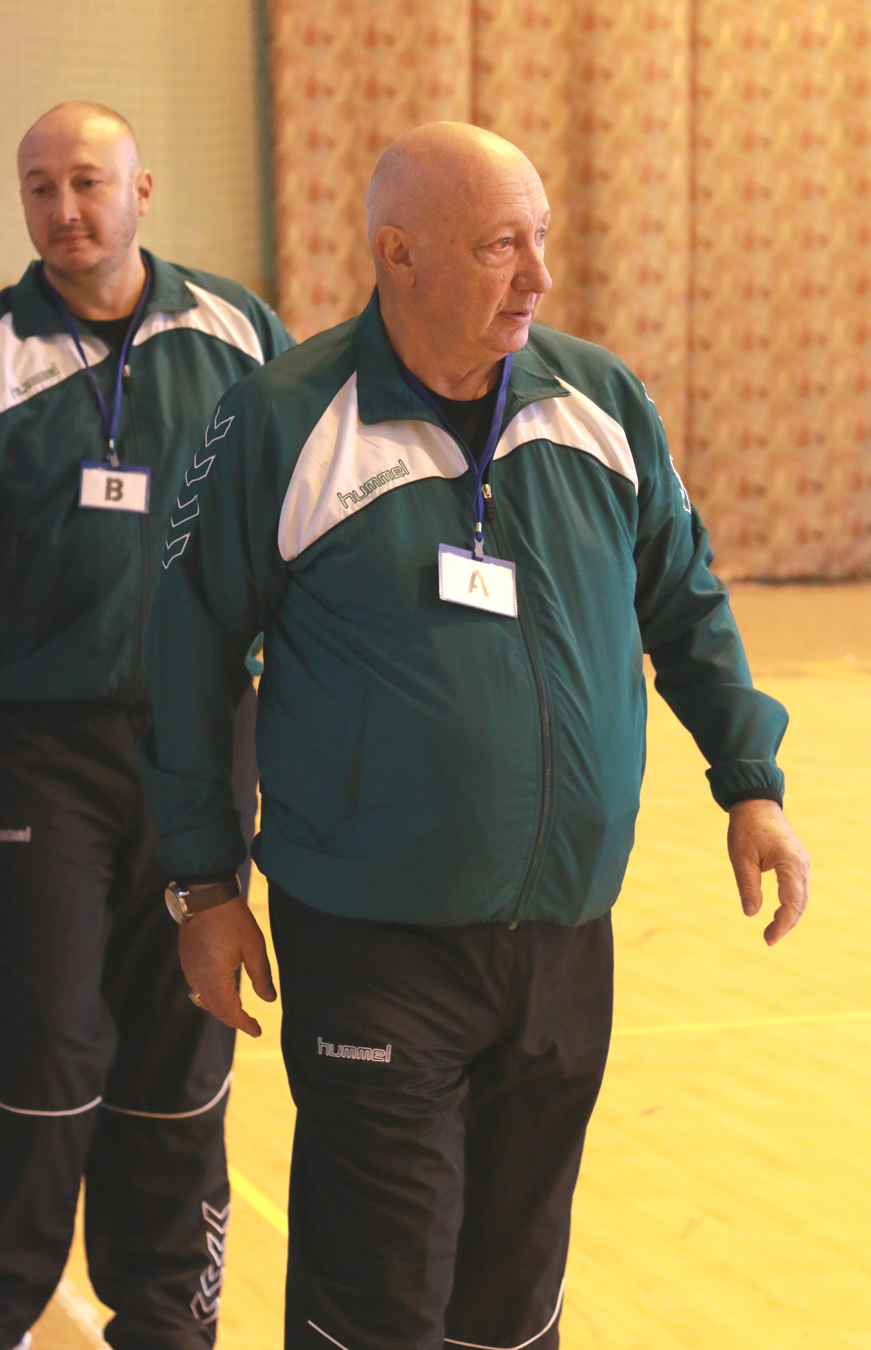 Українські гандбольні тренери Михайло та Борис Милославські